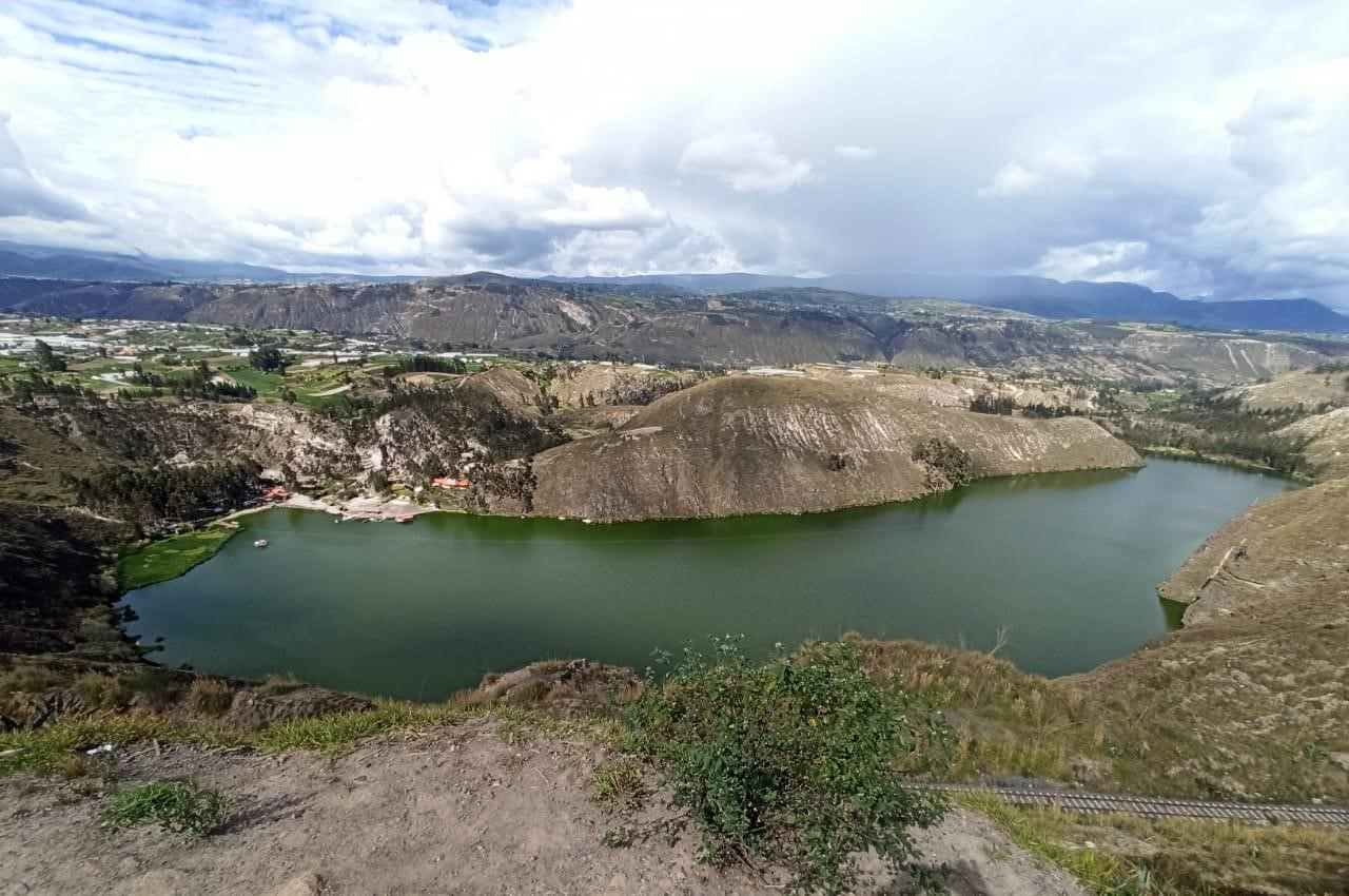 Foto panorámica de la Laguna de Yambo del 2020